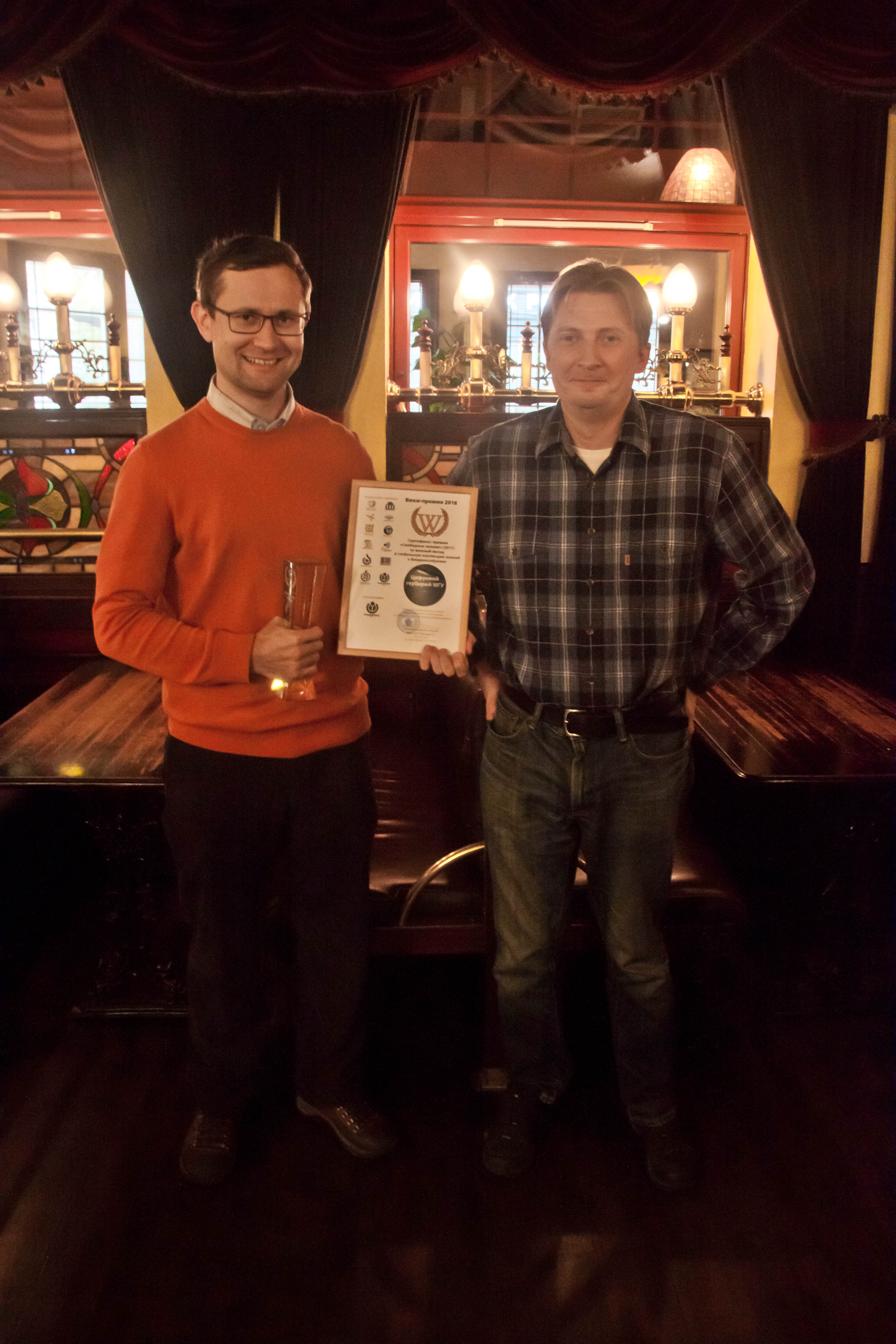 Стас Козловский вручает Алексею Серегину Википремию "Свободные знания" за проект "Цифровой Гербарий МГУ"